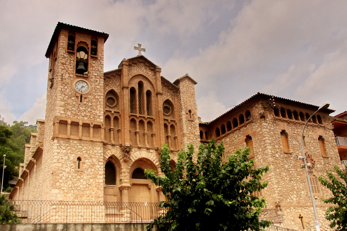 Església de Sant Esteve de Cervelló, obra modernista d'Antoni Maria Gallissà i Soqué de 1903 a Cervelló (Catalunya)